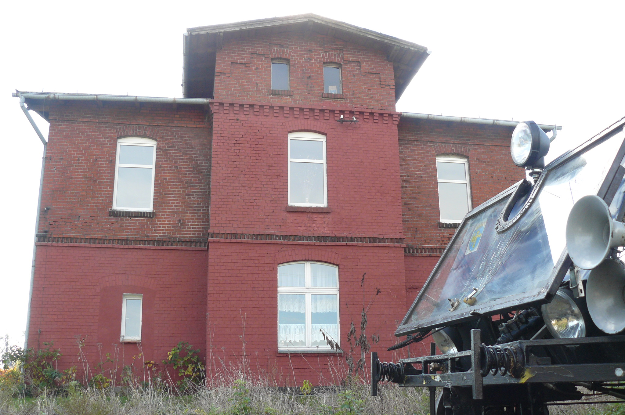 Lubrza - dworzec i stacja kolejowa.